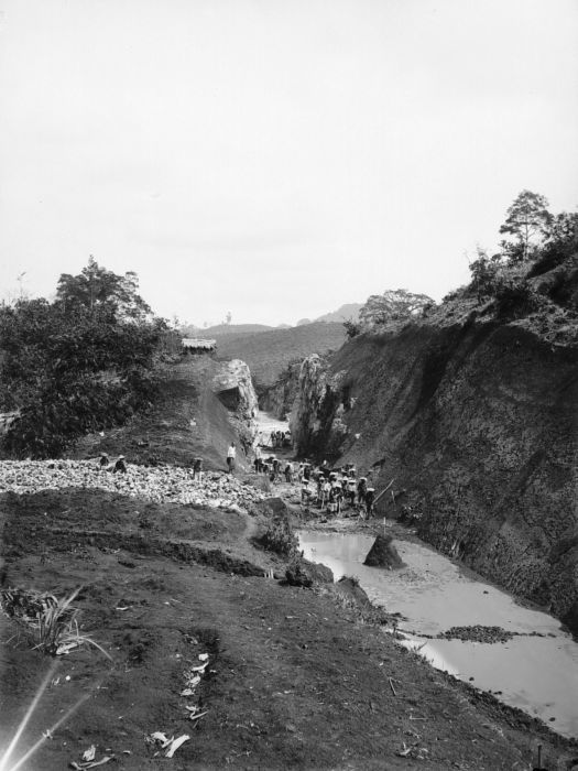 Repronegatief. Arbeiders bij wegaanleg bij Plampangan, Java